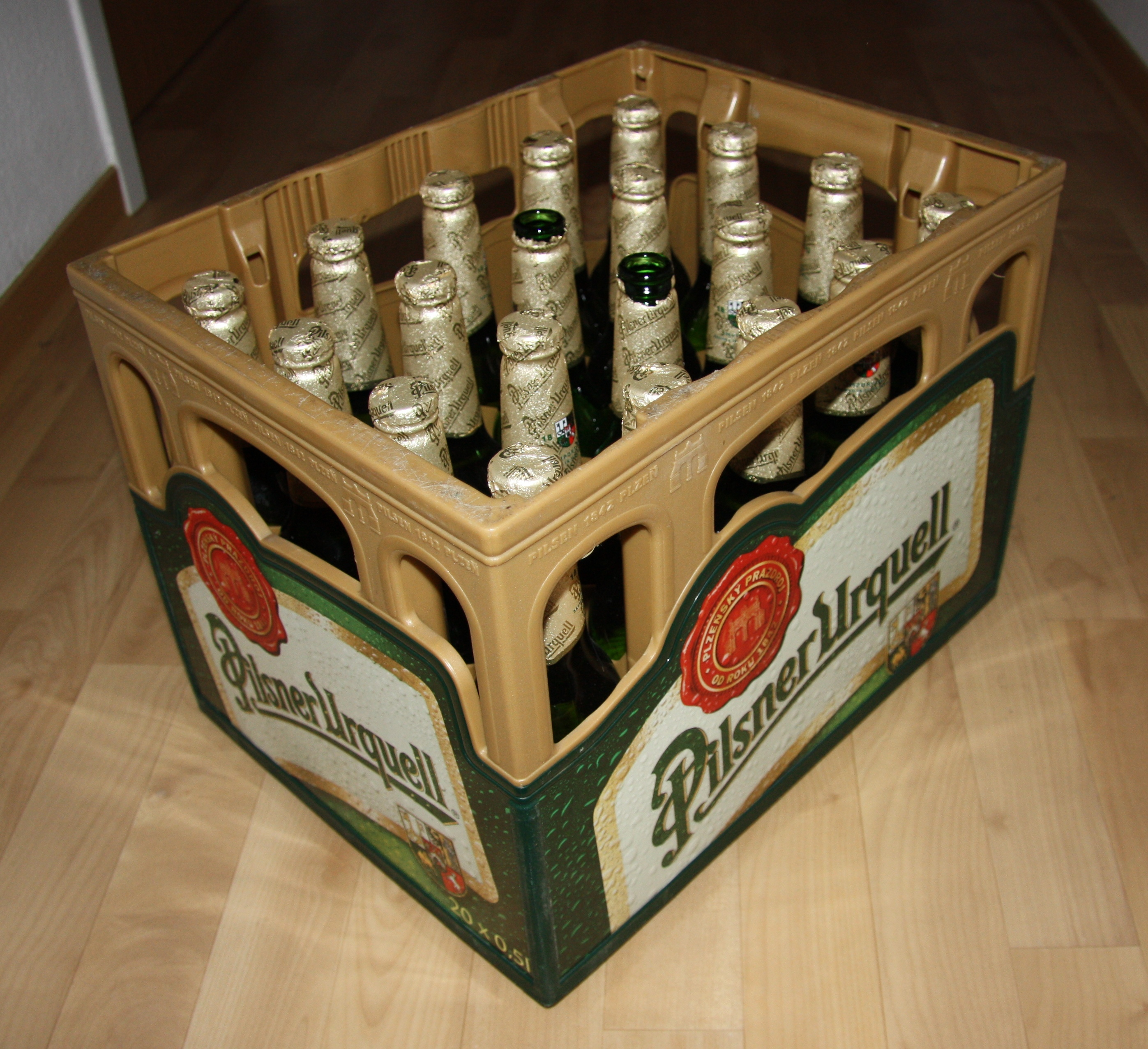 Pilsner Urquell, gekauft in Deutschland.